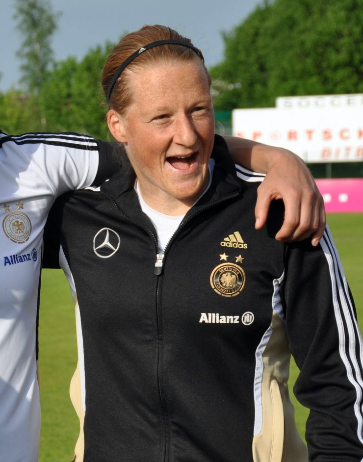 Melanie Behringer Cropped from File:Deutsche Frauen-Nationalmannschaft.jpg